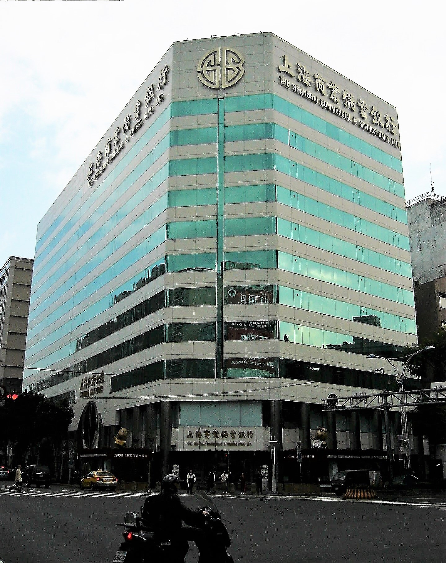 上海銀行大樓，是上海商業儲蓄銀行總行所在地。